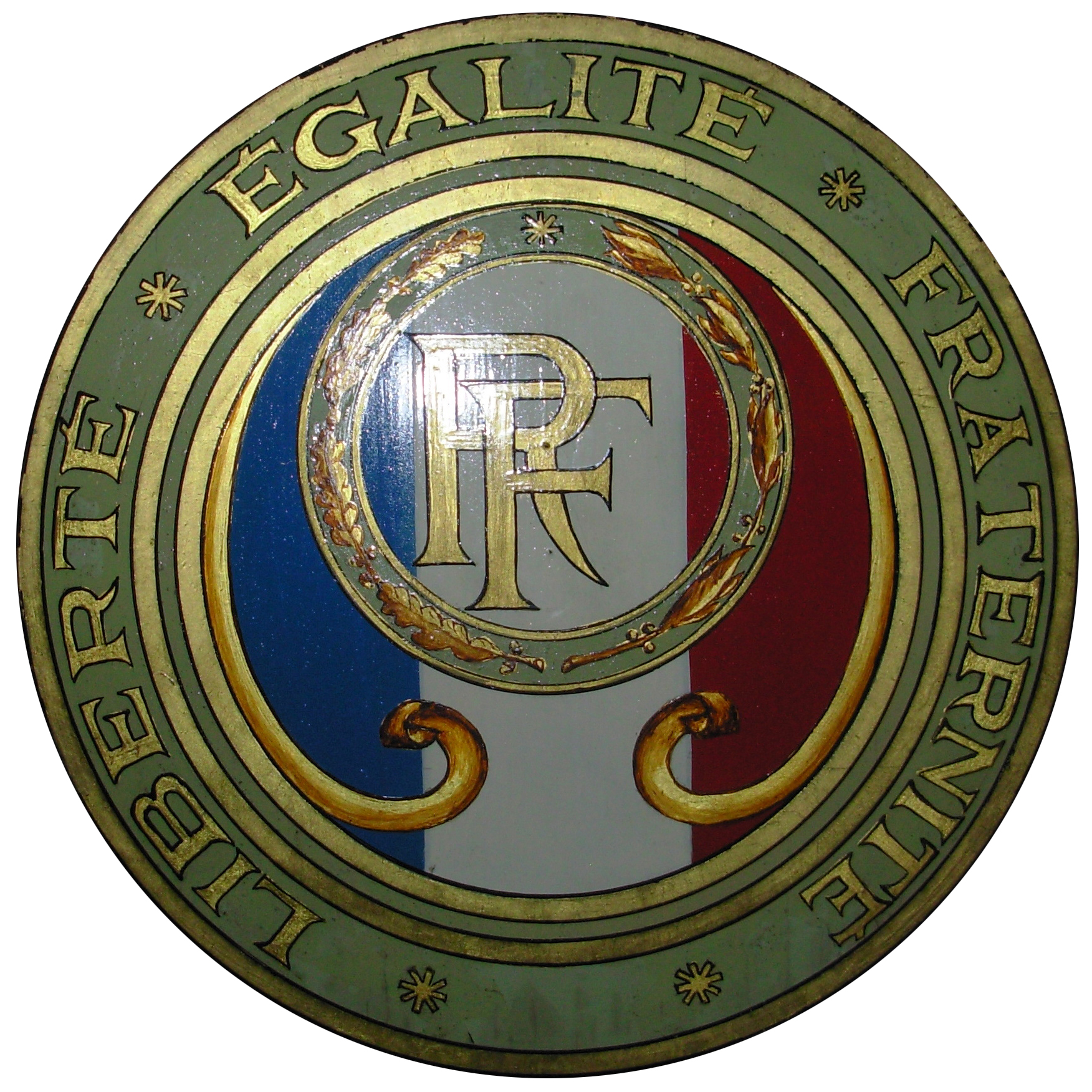 Symbol and motto from République française